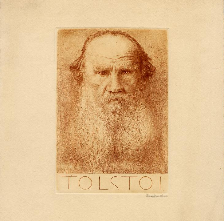 Emma Löwenstamm (1879—1941). Portrét Lva Tolstého. Židovské muzeum v Praze, inventární číslo: 077.817